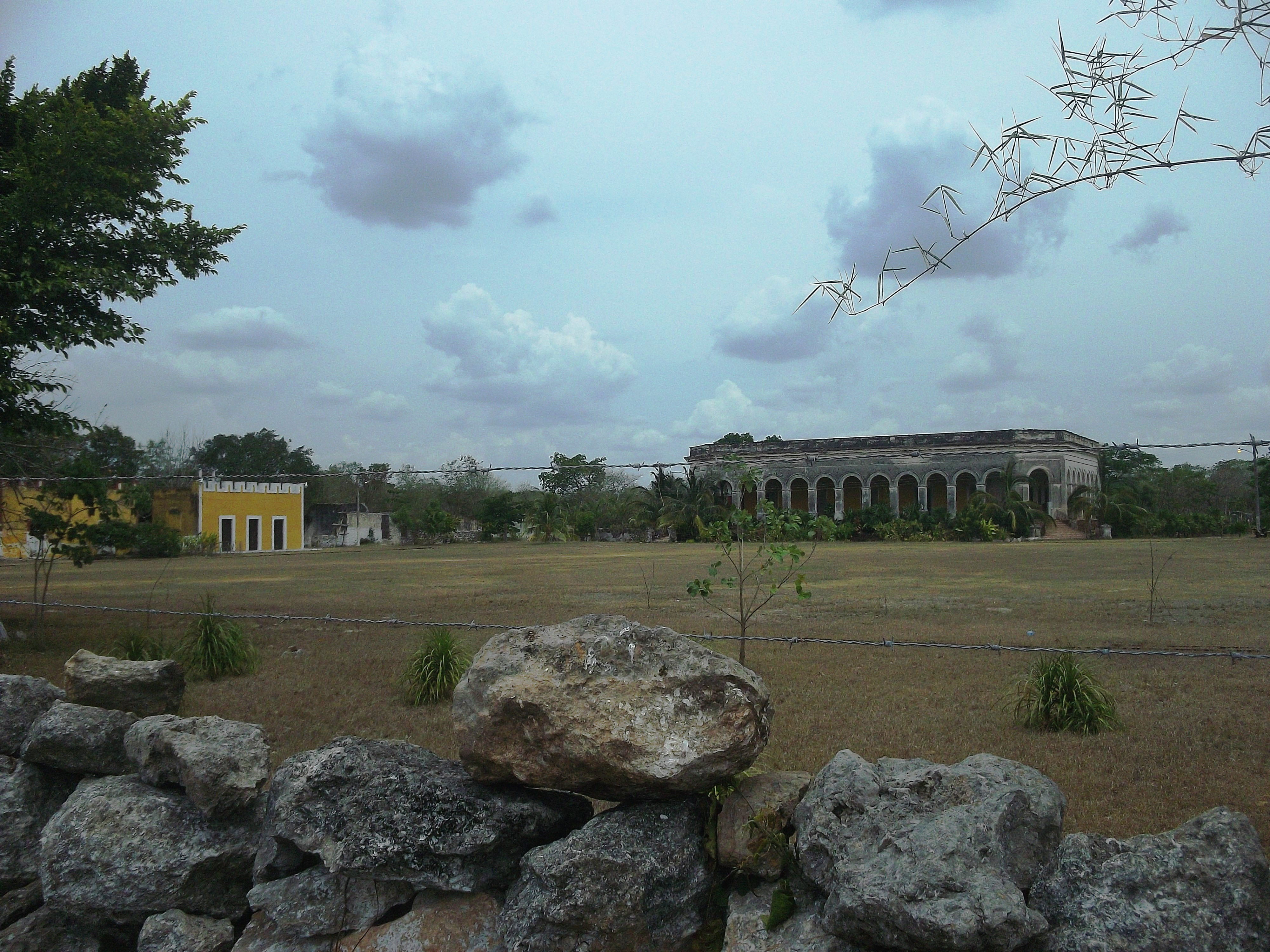 Hacienda de Cucá, Yucatán.